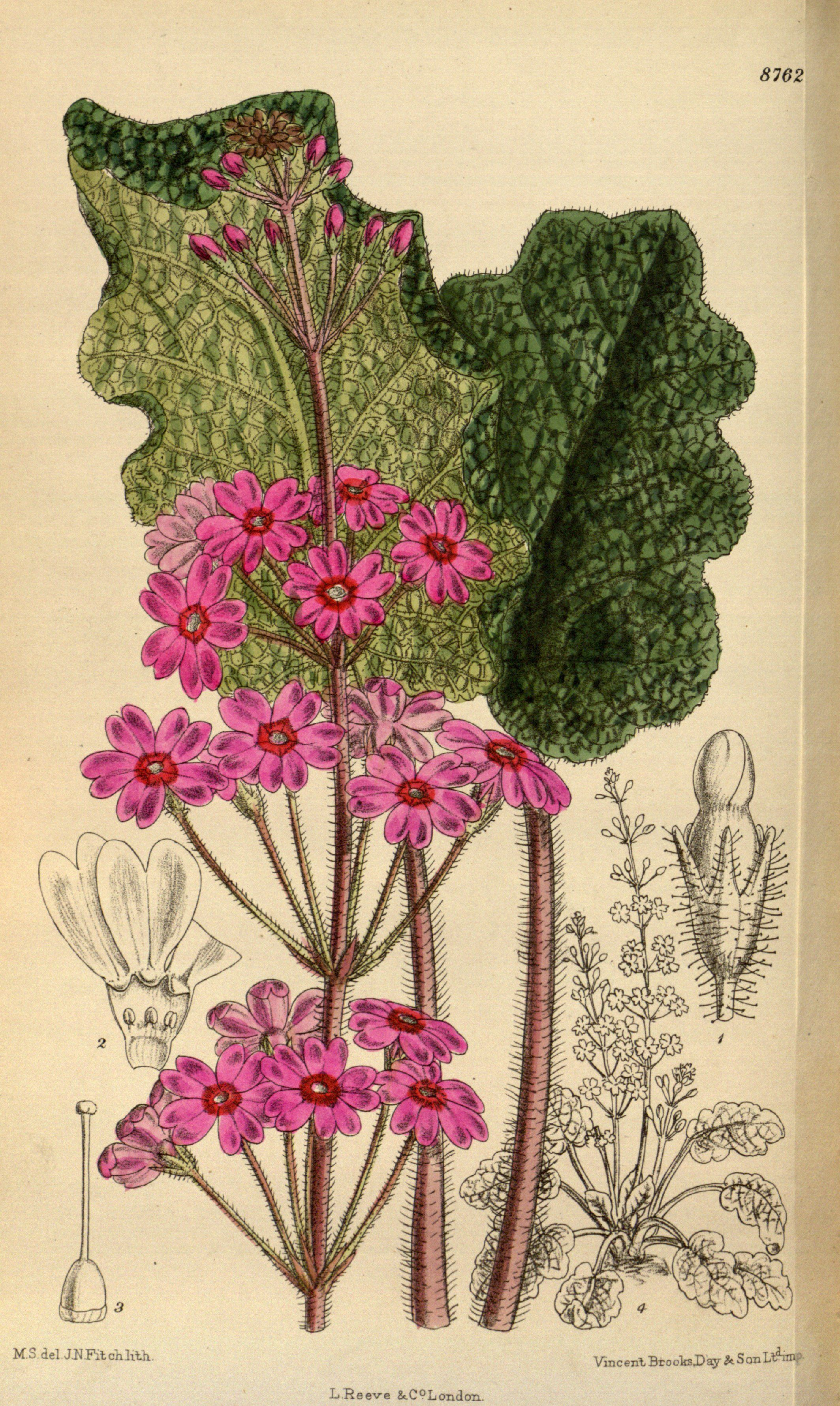 Primula silvicola (= Primula sinomollis), Primulaceae